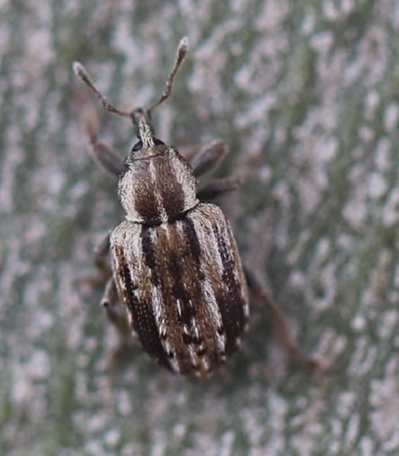 Rüsselkäfer Hypera venusta am 17. Juni 2020 an einer Platane in Walldorf/Baden